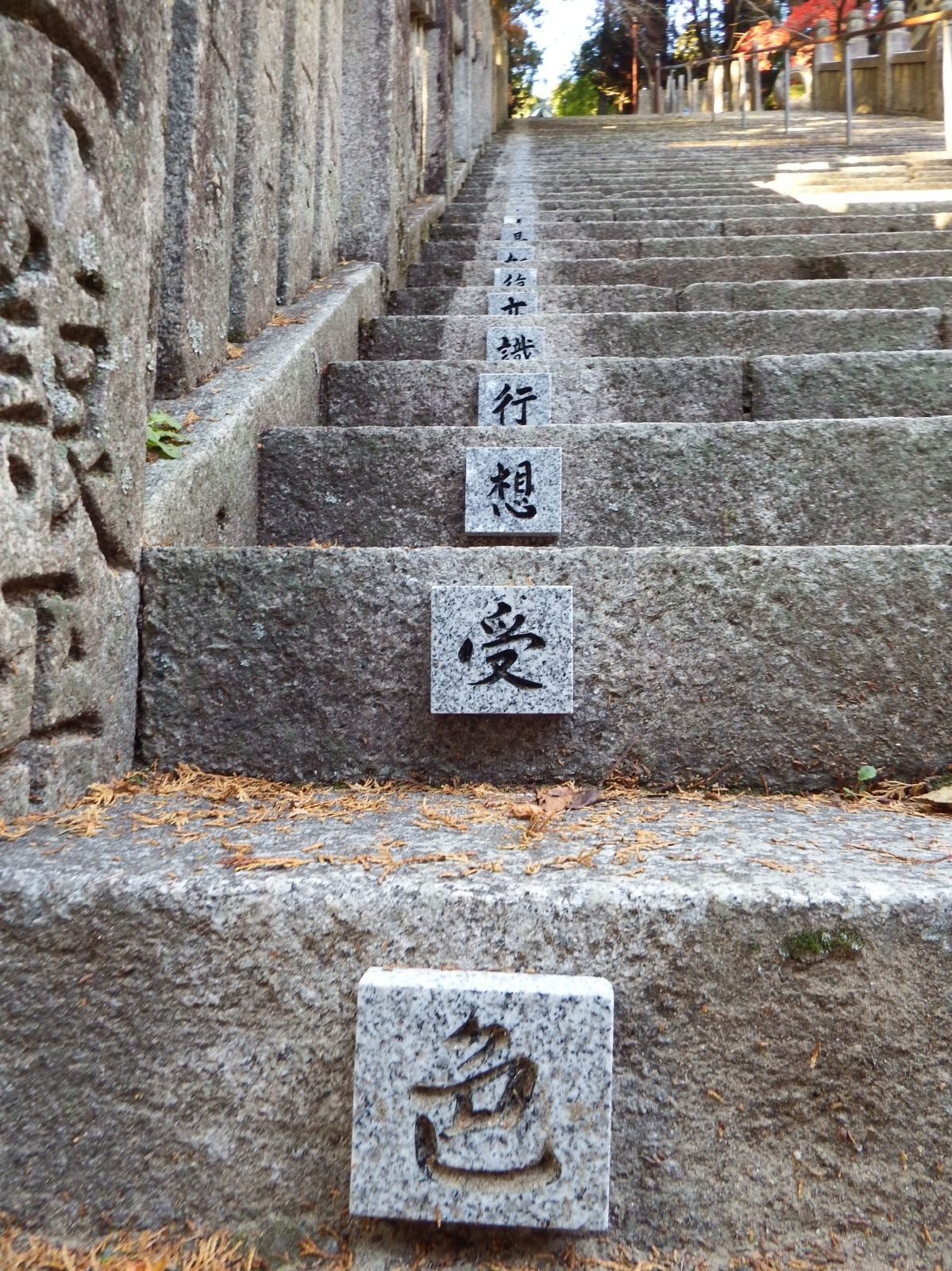 箸蔵寺の石段